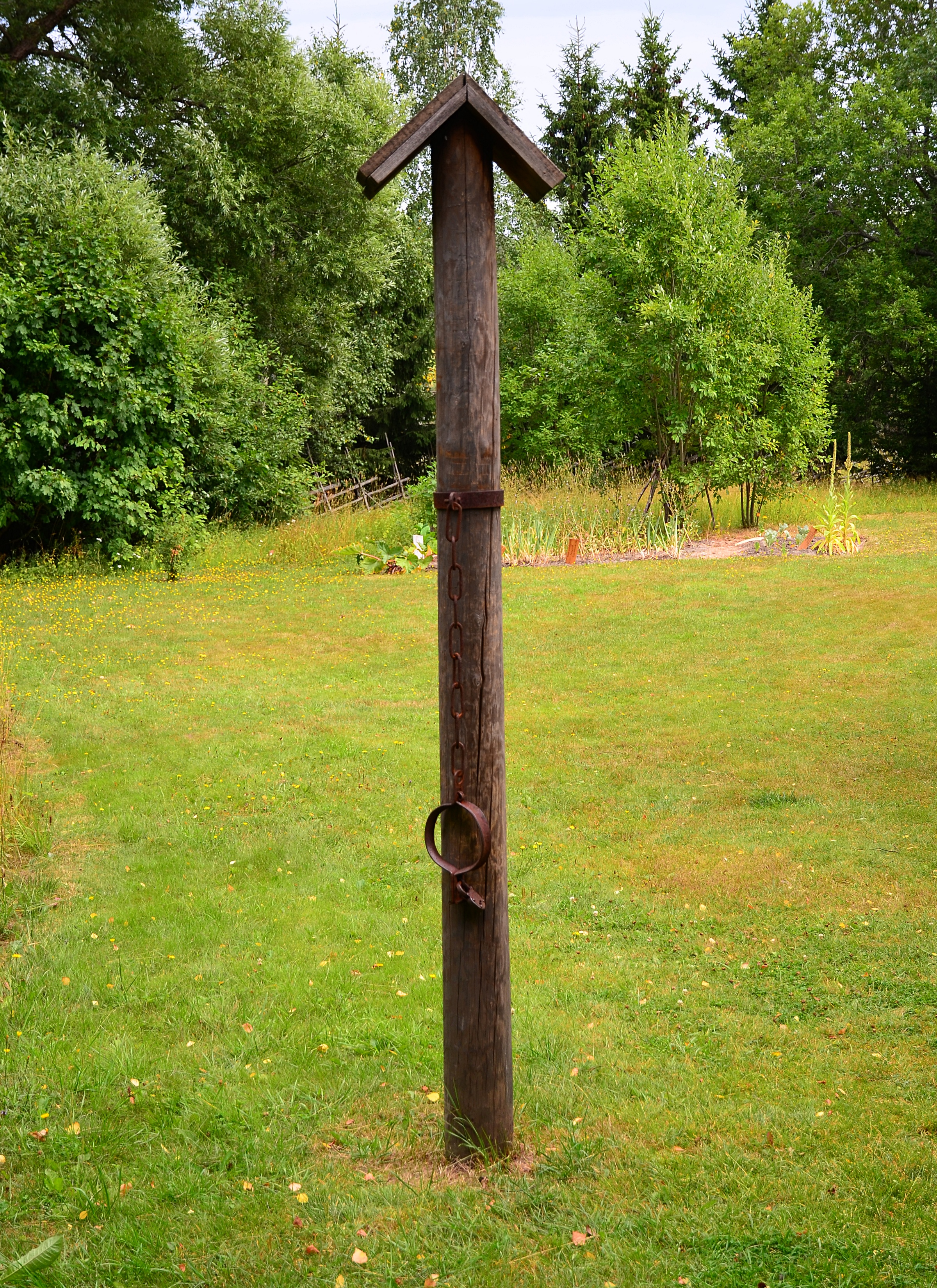 Skampåle, Sagalunds museum, Kimito, Finland.